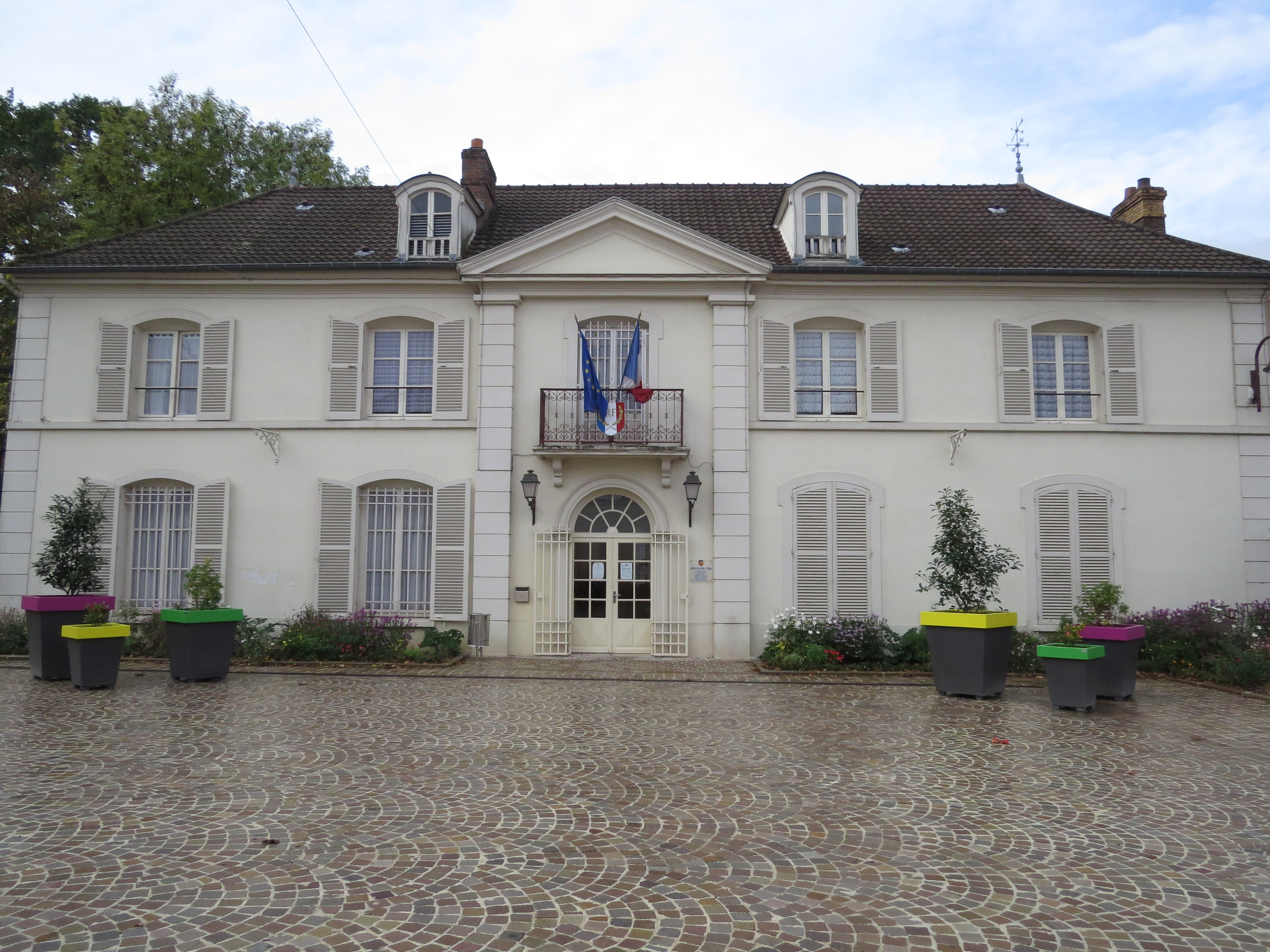 Mairie d'Egly (91)